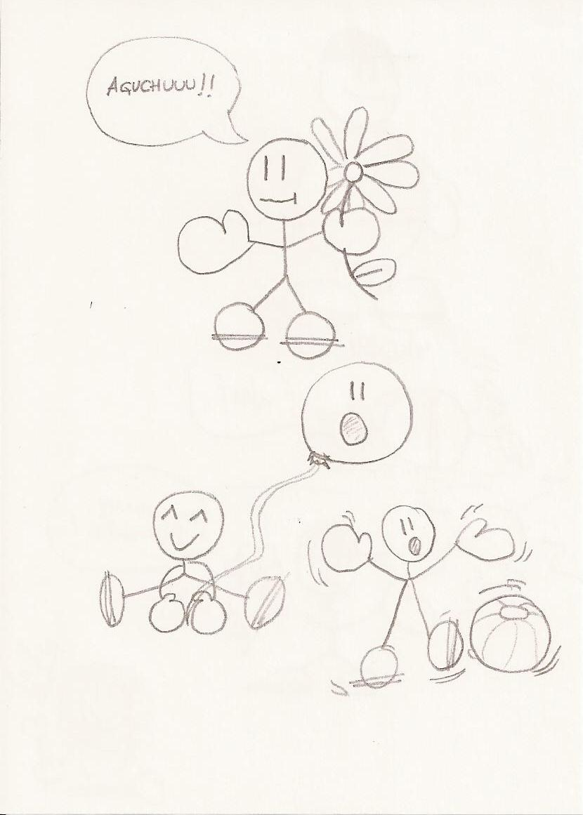 Love, Art by kids